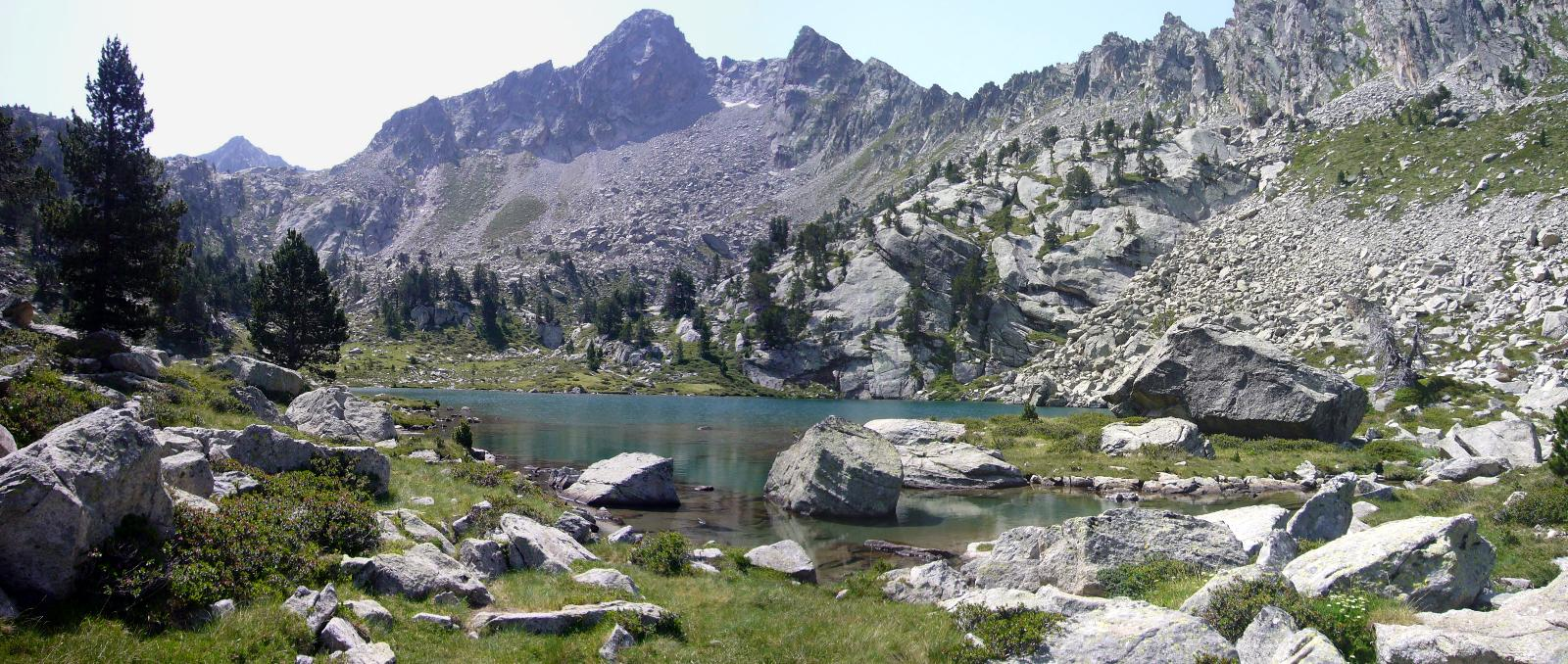 Pic de la Montanyeta i Estany de les Corticelles; la Vall de Boí, Alta Ribagorça, Catalunya